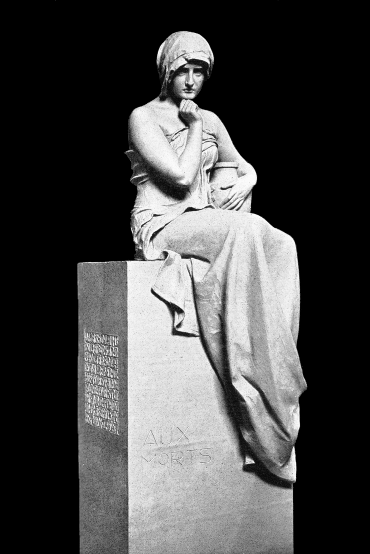 Grabmalsskulptur "Aux Morts" von Hans Dammann. Aufgenommen auf der Großen Berliner Kunstausstellung 1904.